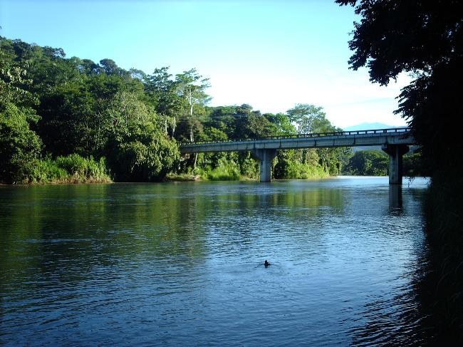 Puente sobre el Río Barú. Domincial